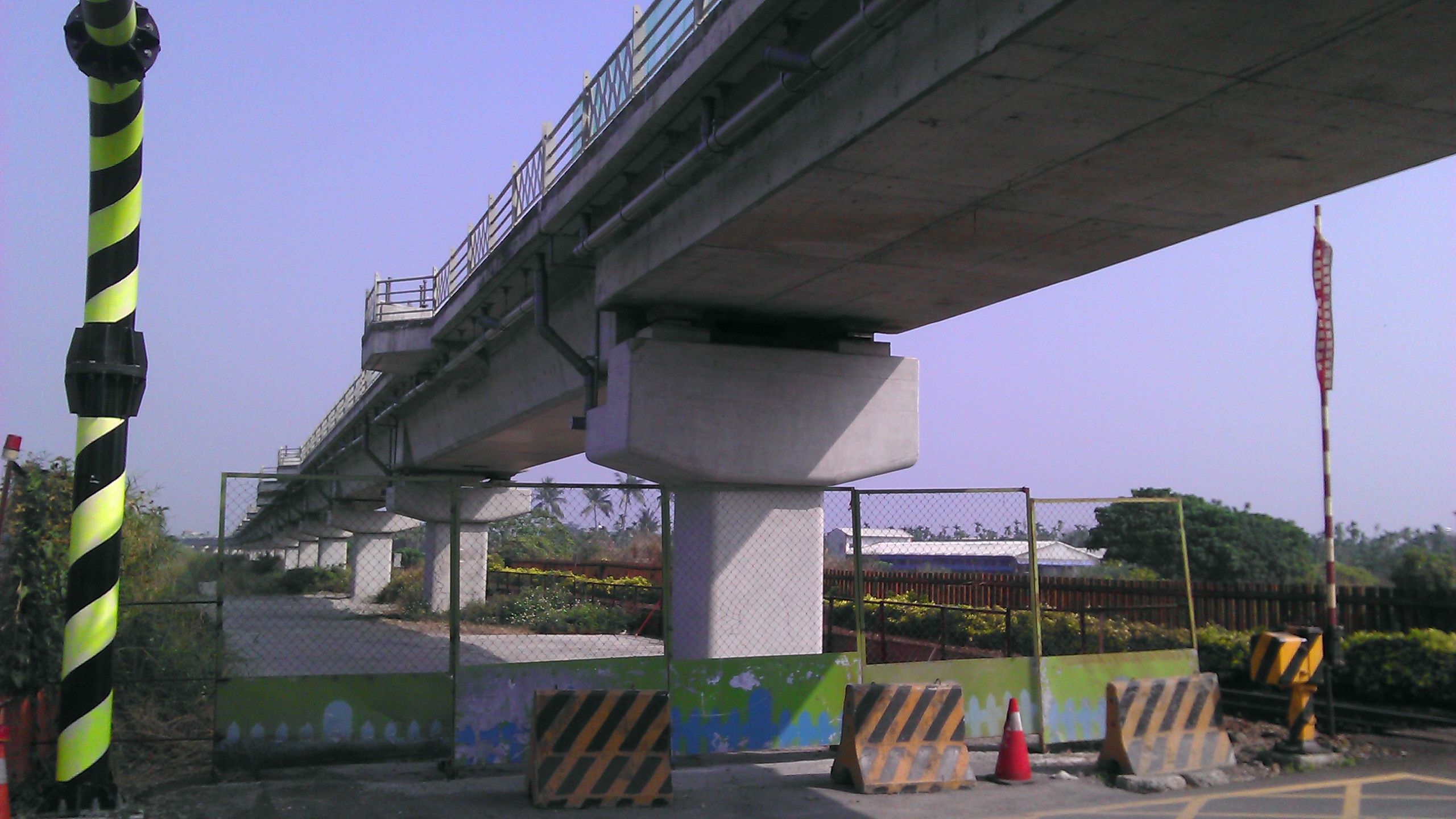 臺鐵屏東線高架化工程一景。